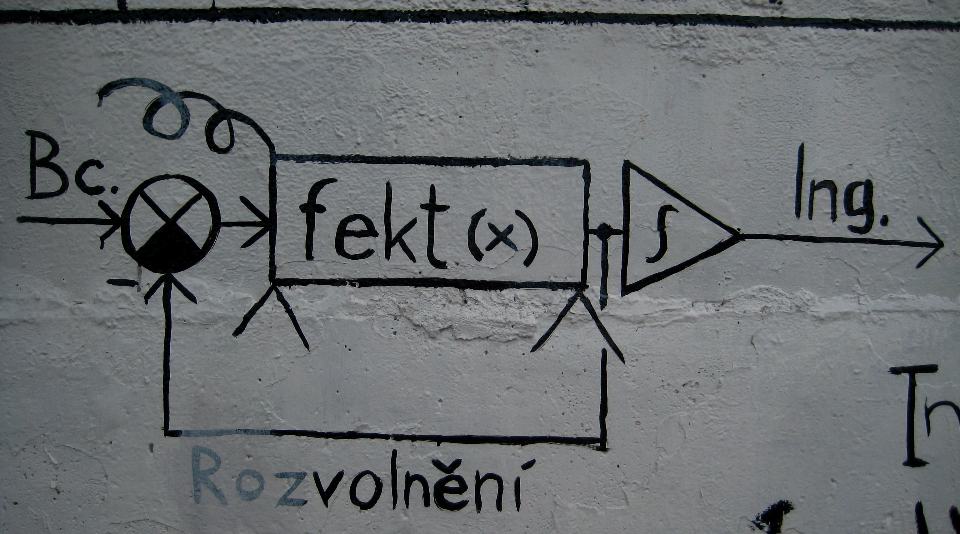 Zeď s podpisy absolventů Fakulty elektrotechniky a komunikačních technologií Vysokého učení technického v Brně na ulici Kolejní v areálu kampusu Pod Palackého vrchem